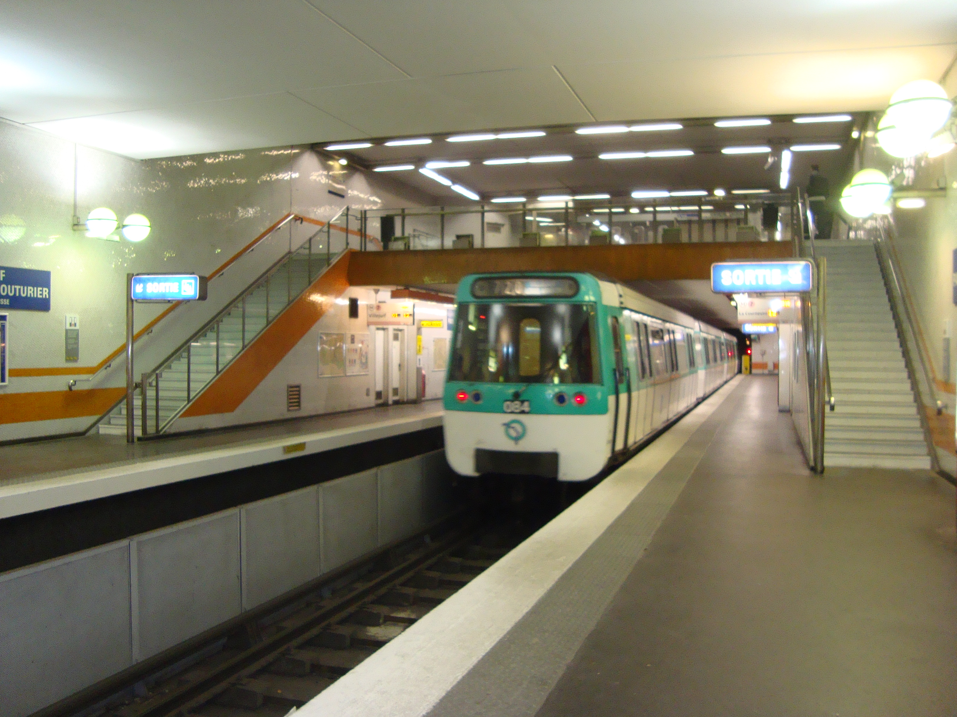 Une rame quitte la station Villejuif - Paul Vaillant-Couturier en direction de La Courneuve.